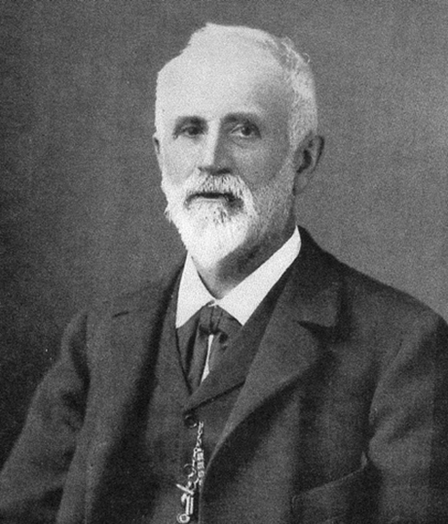 Portrait d'Auguste Lalance.